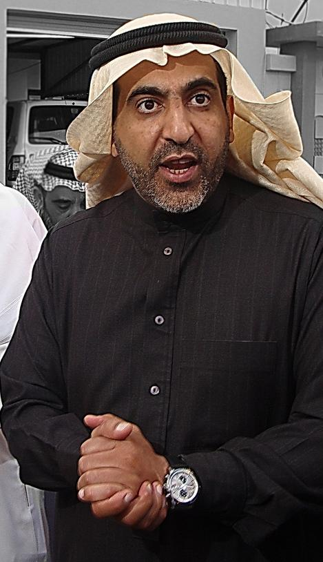 Musaad Al-Sulim Unaizah governor.